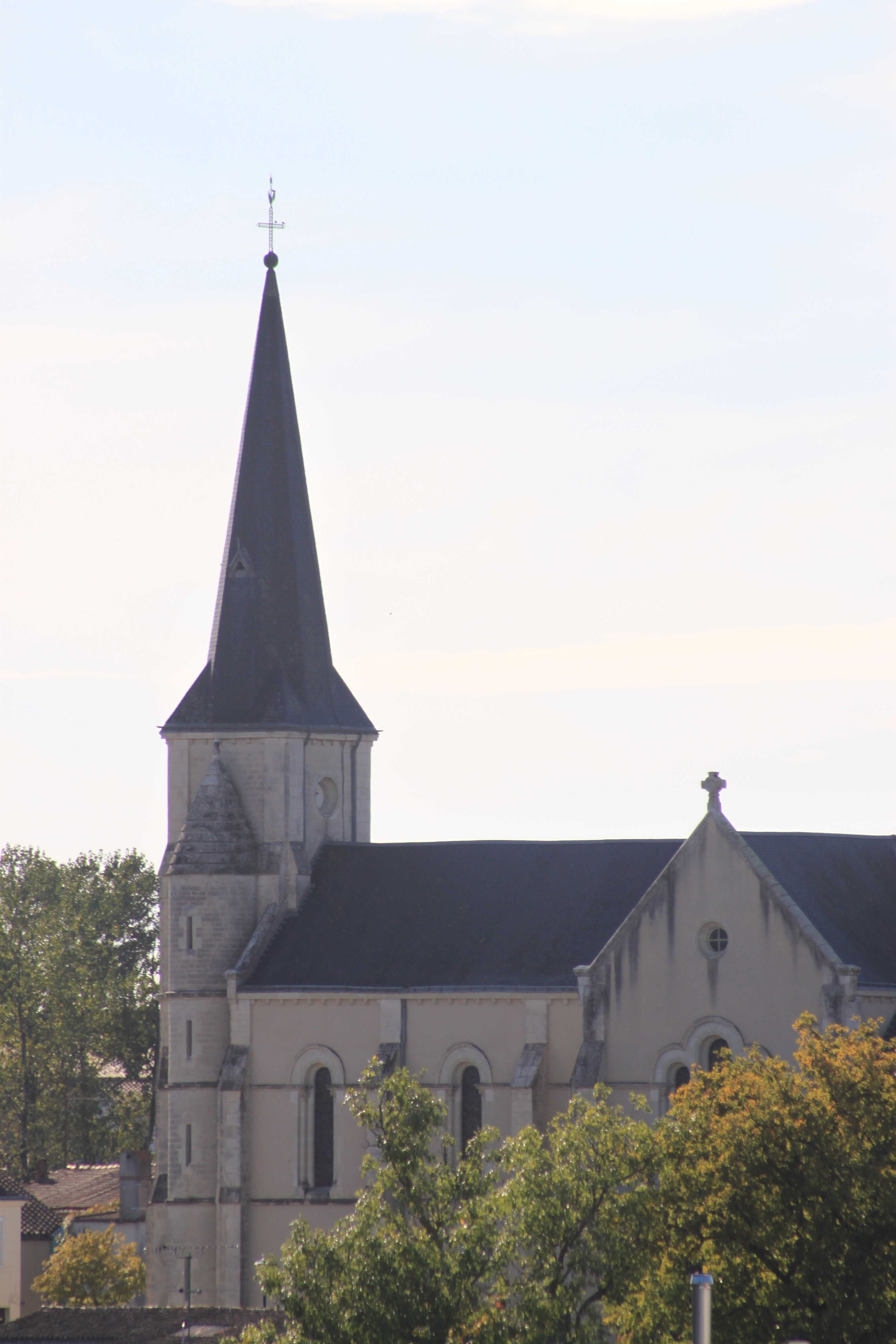 Église Sainte-Florence, Fr-85-Sainte-Florence.